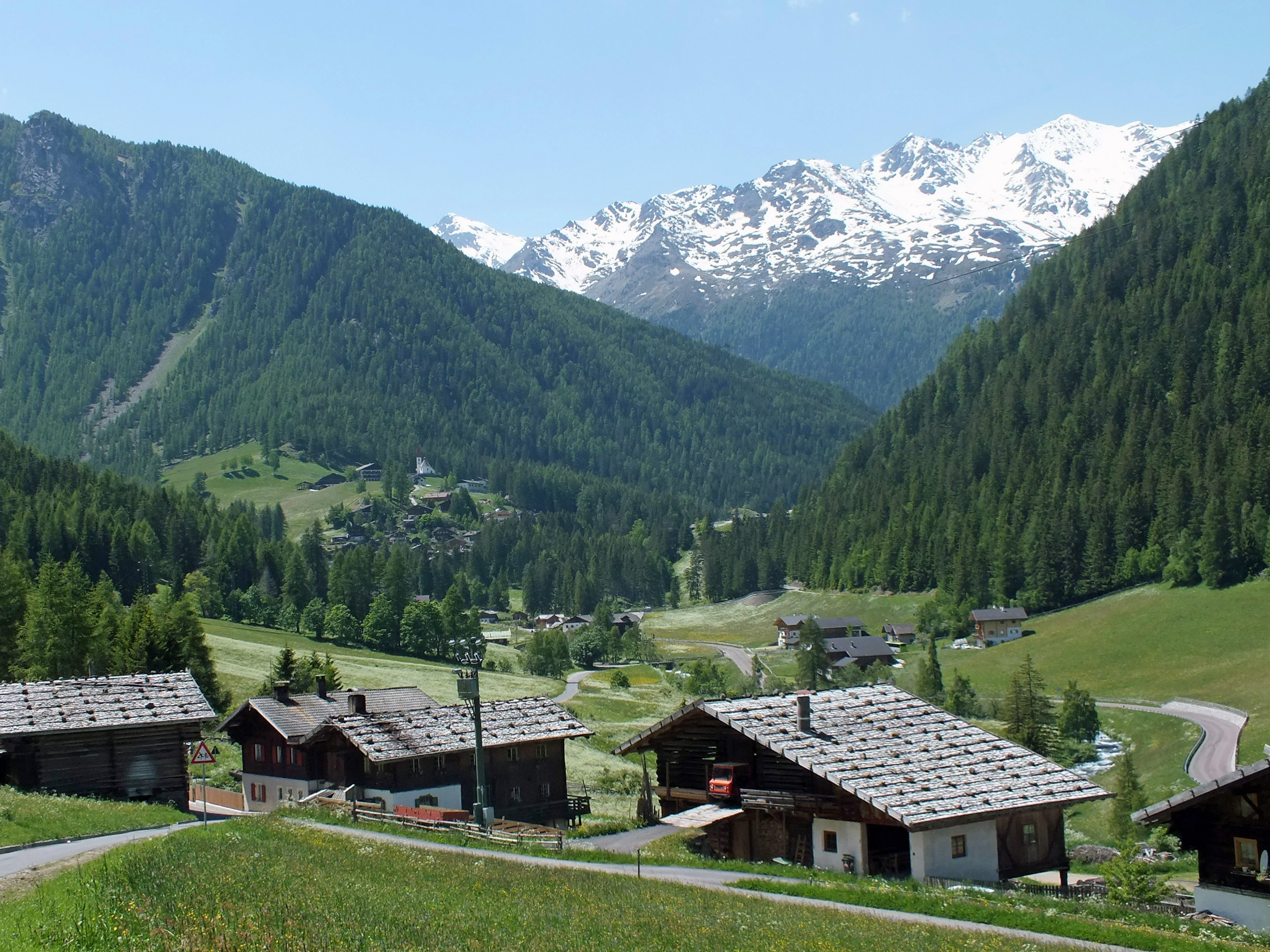 St. Gertraud im Ultental